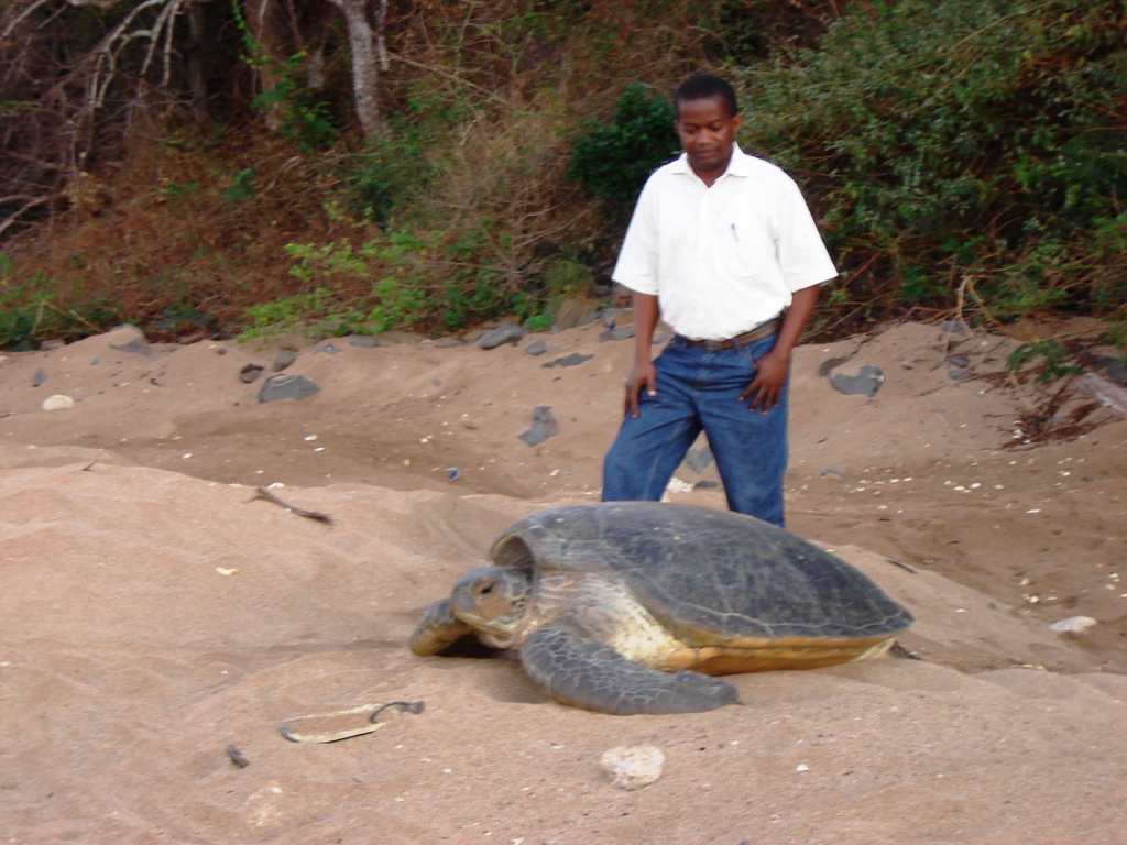 Photo d'une tortue verte et d'un éco-guarde aux Comores